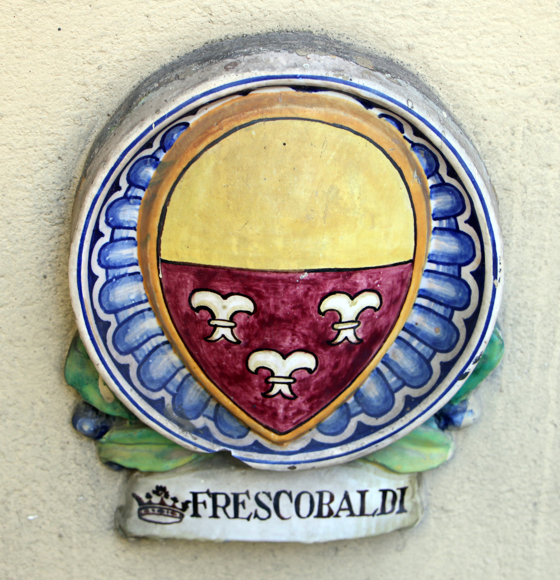 Borgo San Lorenzo